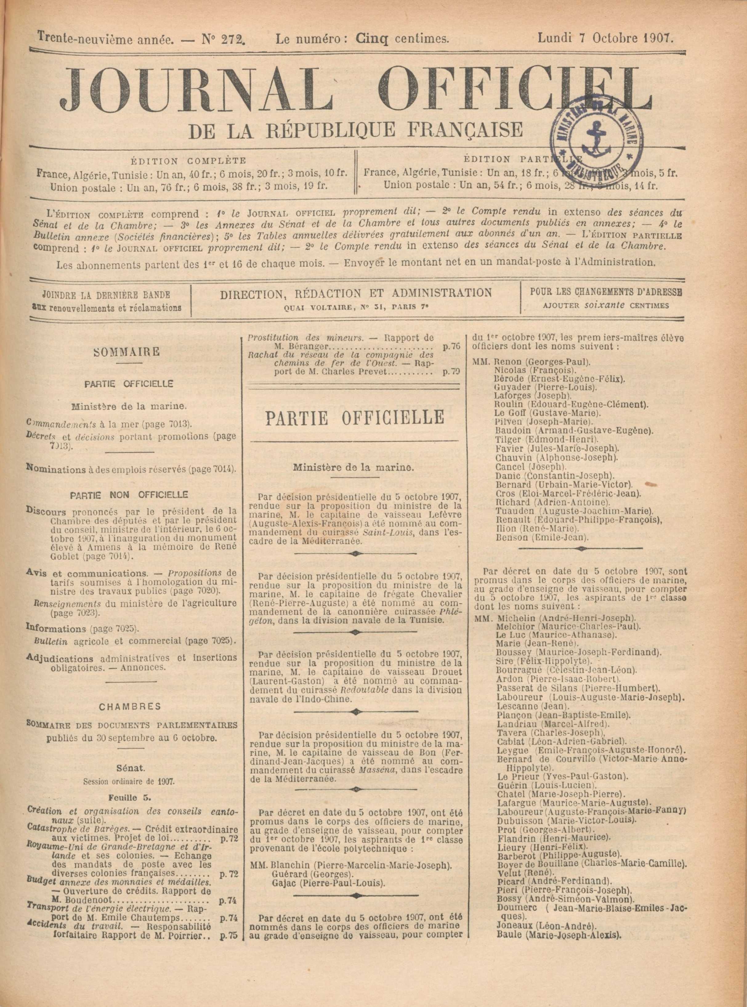 Journal officiel de la République française. Lois et décrets. Journaux officiels (Paris) 7 octobre 1907.